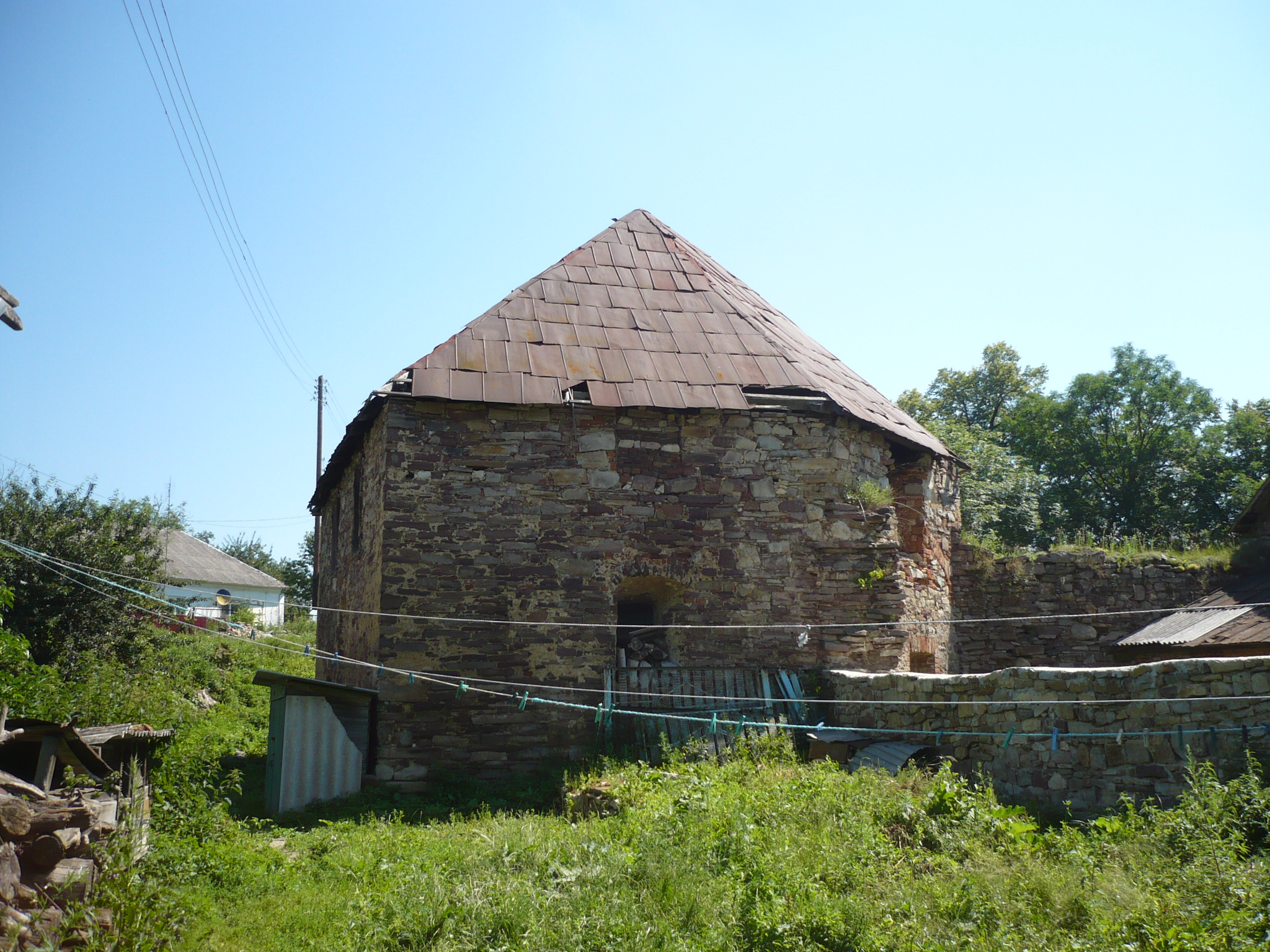 Potok Złoty. Zamek